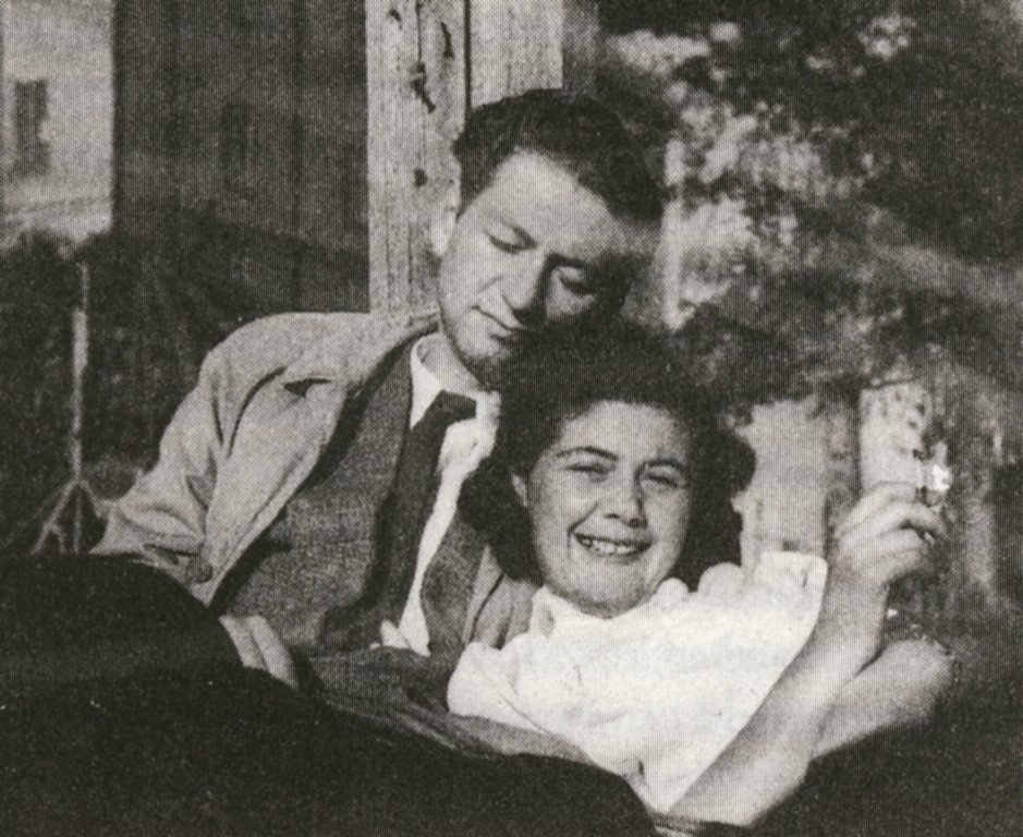 Jerzy och Nina Einhorn i Landskrona 1946